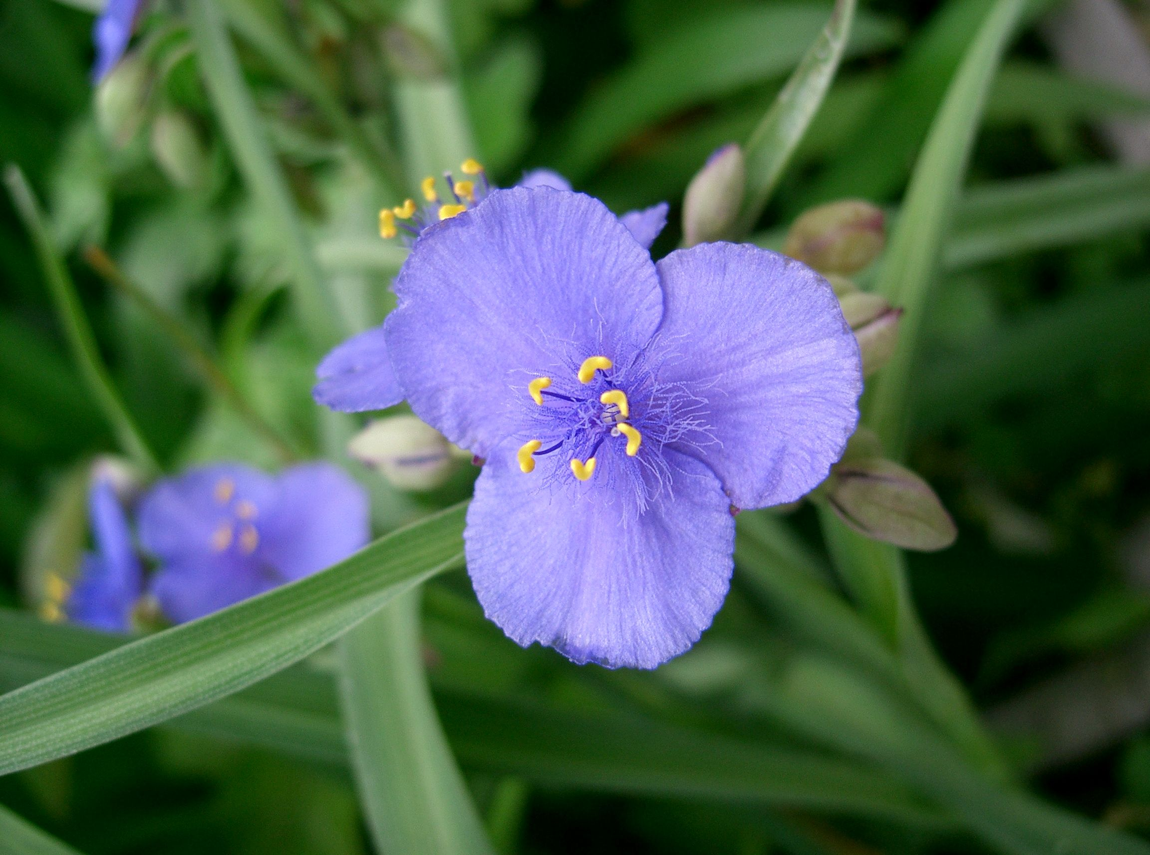 Tradescantia ohiensis